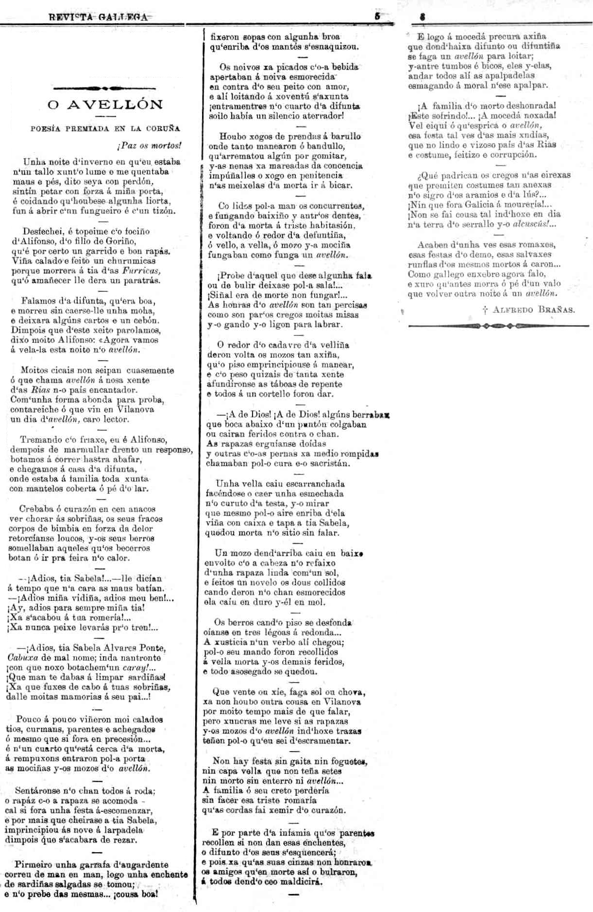 "O abellón"